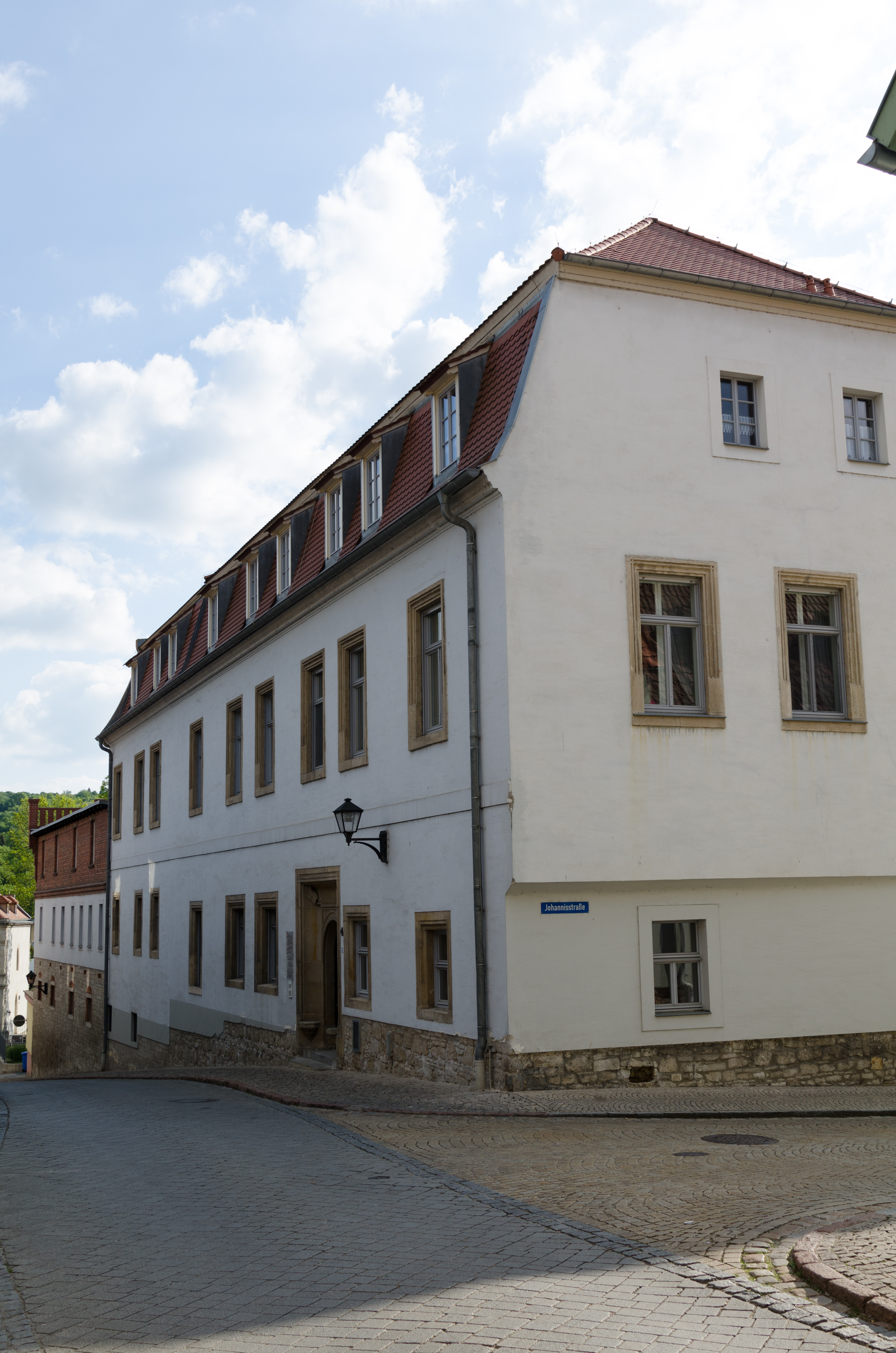 Freyburg an der Unstrut, Marienstraße 4, 4a